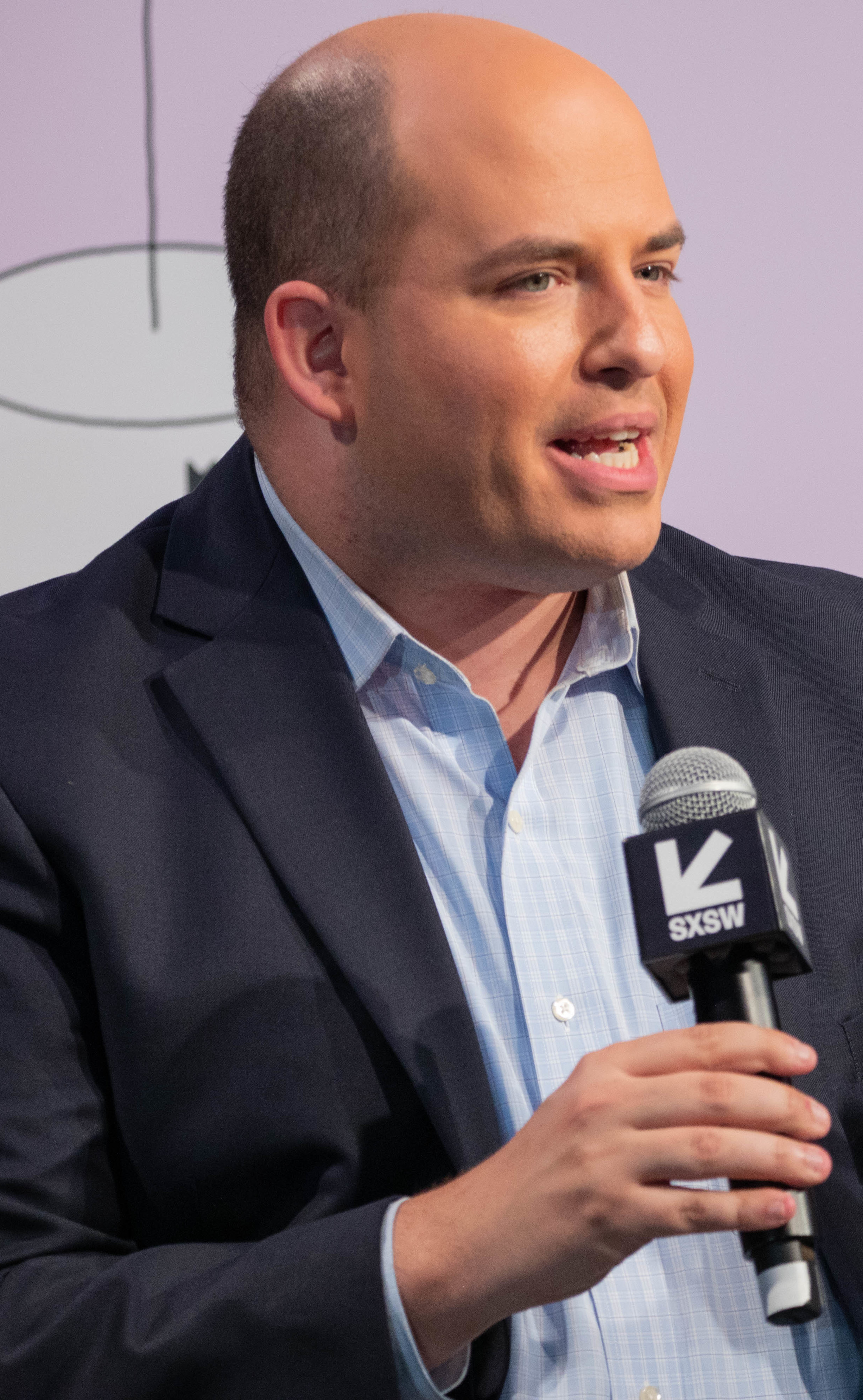 Photo: Ståle Grut / NRKbeta